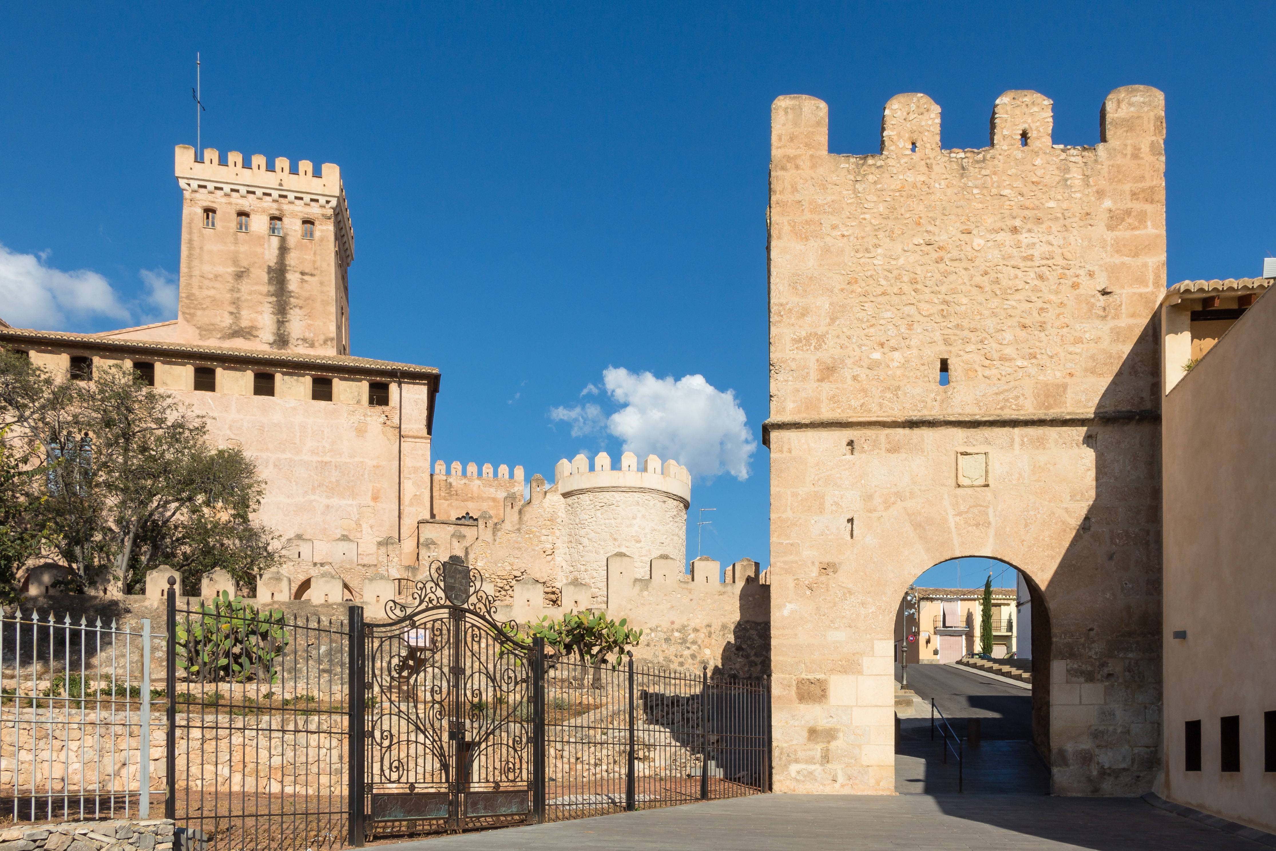 De las antiguas Murallas de Benisanó hoy quedan tres portales diferentes: el de Bétera, el de Llíria y el de Valencia 11.067-008.